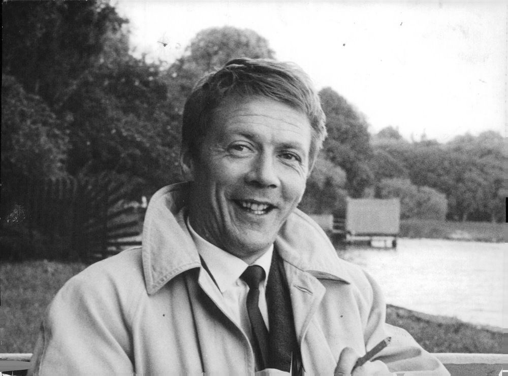 "Unik komisk karakteriseringskonst" – "Underbar förmåga att av en nästan stum roll skapa en levande gestalt" – "Han ger även den socialt mest obetydliga person en egenartad värdighet" – "En psykologisk presentation av stor finess". Så heter det i några på måfå valda recensioner om Allan Edwall under de senaste Dramatenåren, som fört fram denne särpräglade jämte till den absoluta skådespelareliten. Synlikga bevis har han dessutom fått i form av utmärkelser – SvD:s Thaliapris 1960 och de Wahl-stipendiet 1962 – men den djupsinnige humanisten har alltid velat dra sig undan offentligheten. Han har den enkla och respektabla åsikten att konstnären ska tala genom sitt arbete. Den stora TV-publiken har kunnat glädja sig åt den tålmodige och samvetsgranne läraren i Pagnols "Topaze" och en överdådig gubbstudie Ionescos "Stolarna" med Ulla Sjöblom som gumman. För övrigt medverkade Edwall i "Kvartetten som sprängdes" under fjolåret och i "Misantropen".